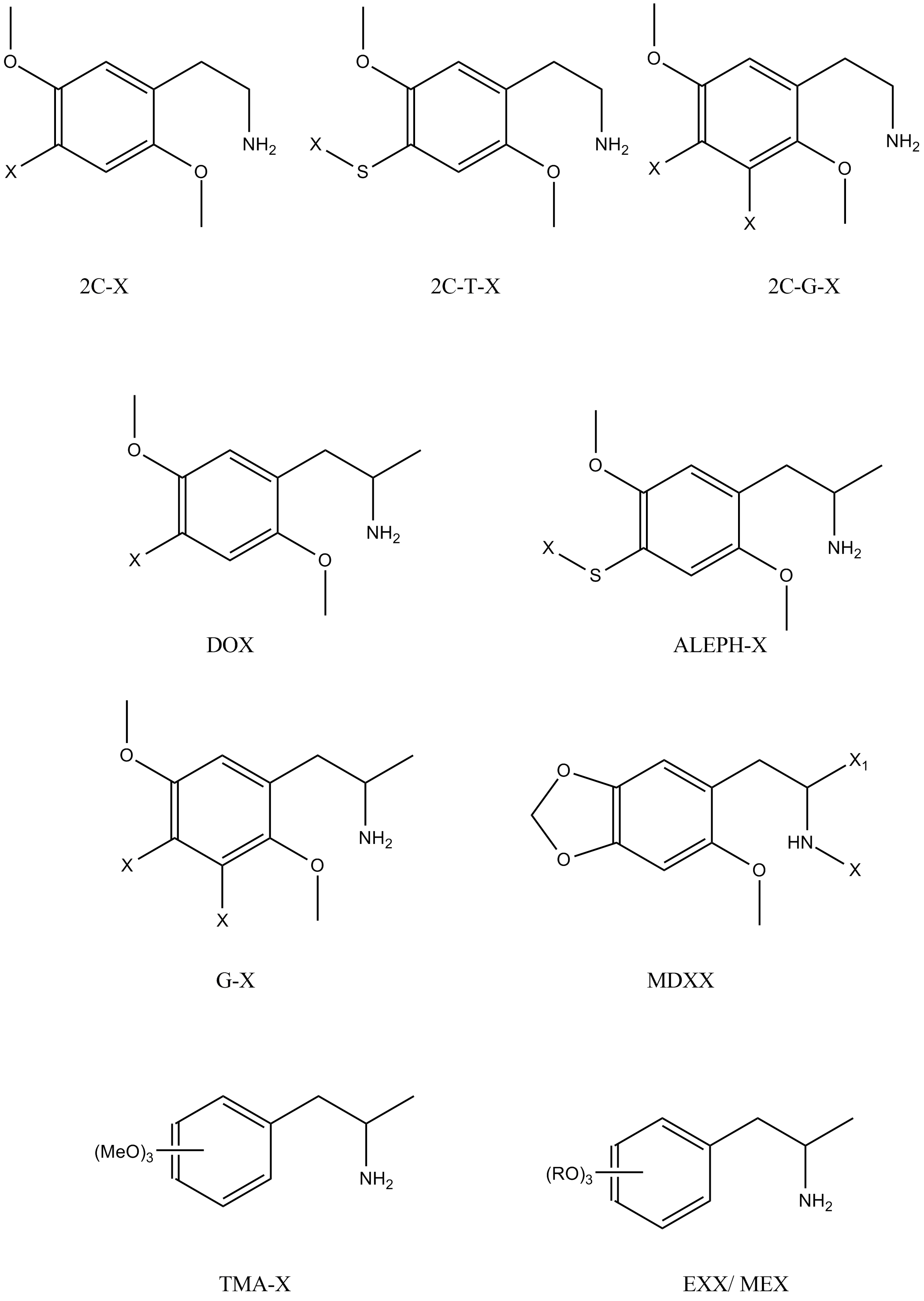 selwergemolt am ChemDraw